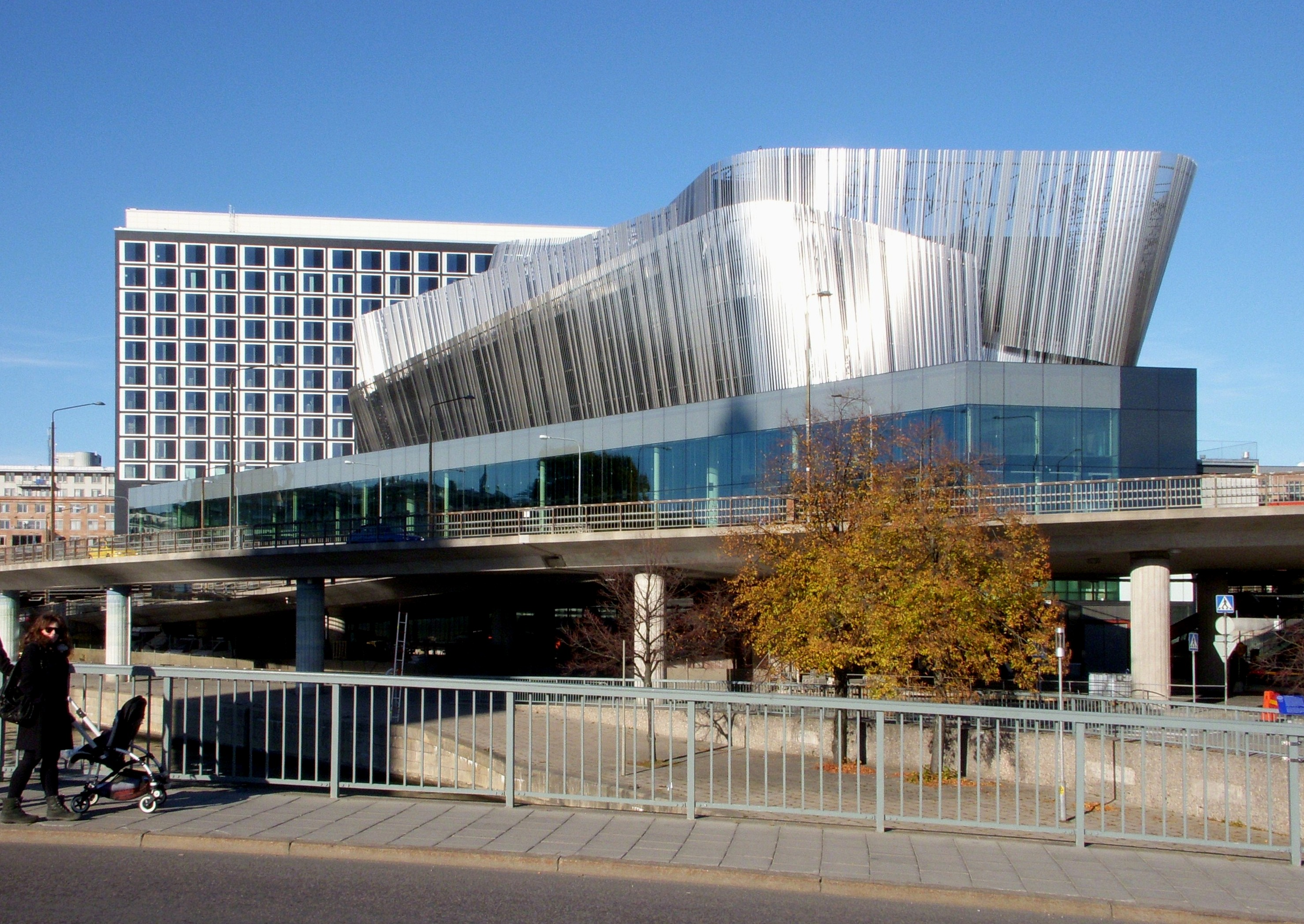 Waterfront Building, Stockholm